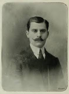 العامل الحر عبد الغني أفندي العريسي، من أصحاب فكرة المؤتمر، وسكرتير لجنتي التحضيرية والإدارية، وصاحب جريدة "المفيد" اليومية في بيروت.